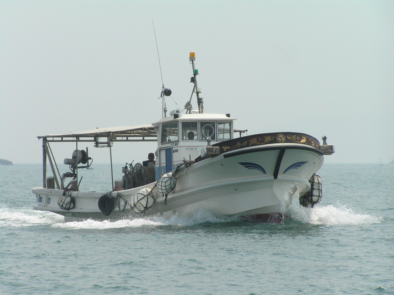 漁船(兵庫県二見沖） ～photo by Autumn Snake 【おぉたむ すねィく探検隊】写真部門 担当 大原佳苗